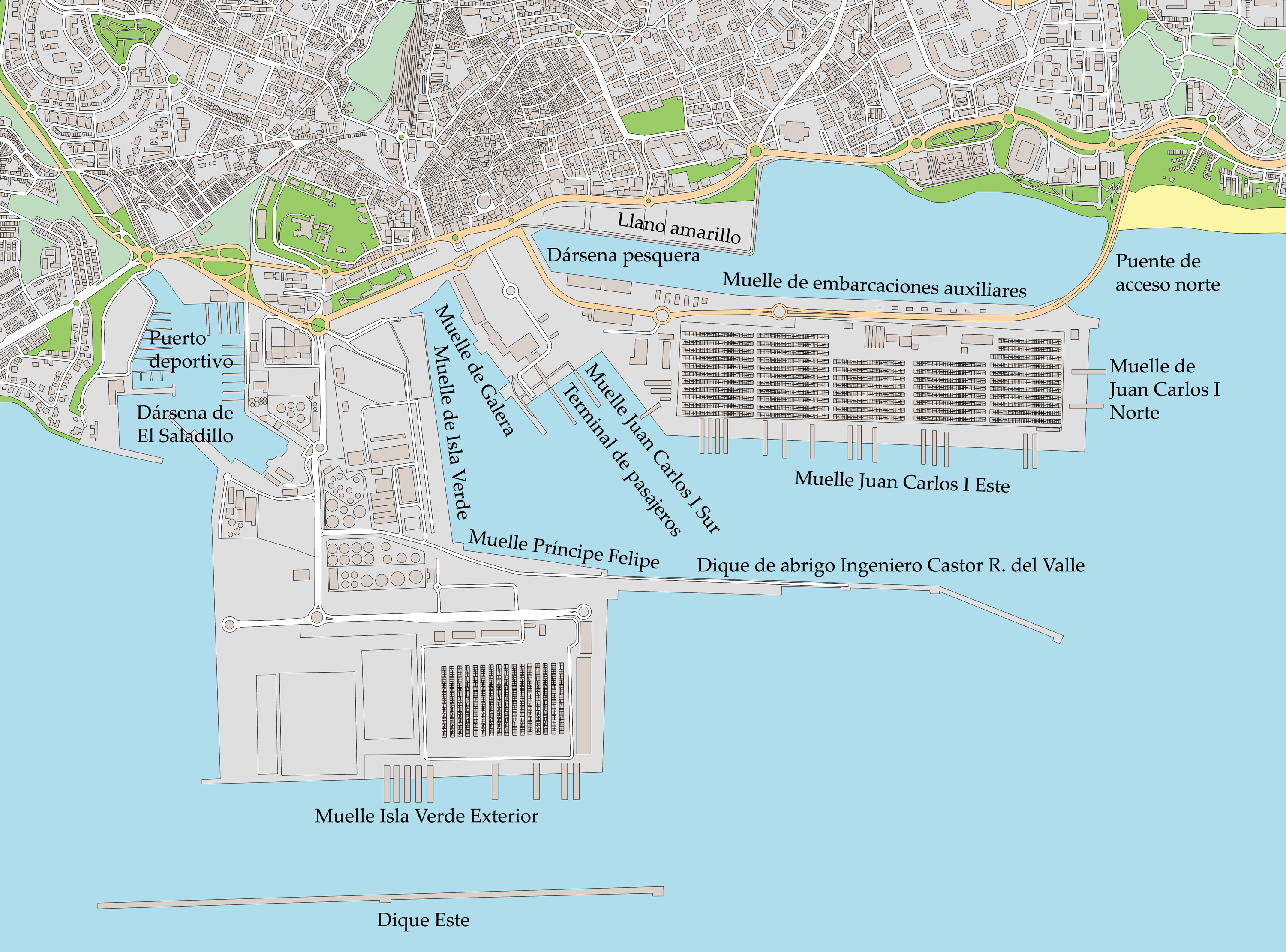 Plano del puerto de Algeciras (España) en el año 2012.